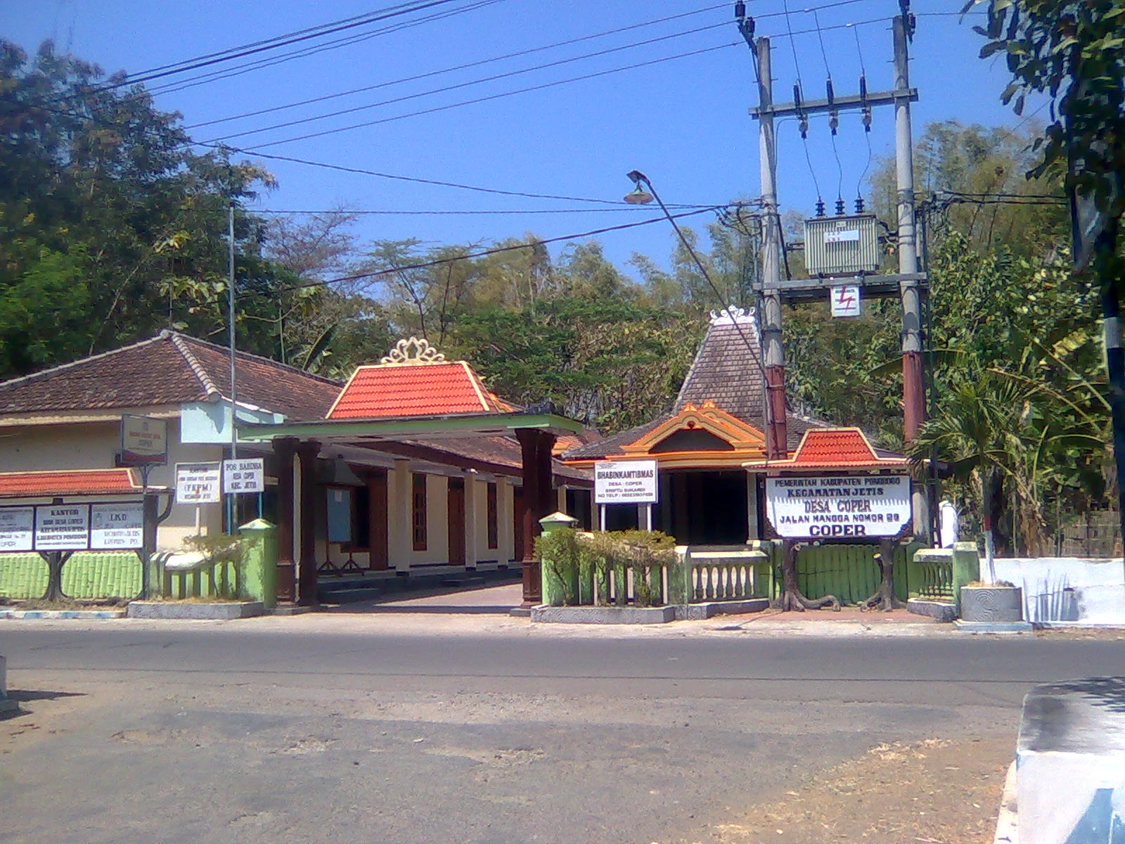 Bali desa Coper Jl. Mangga